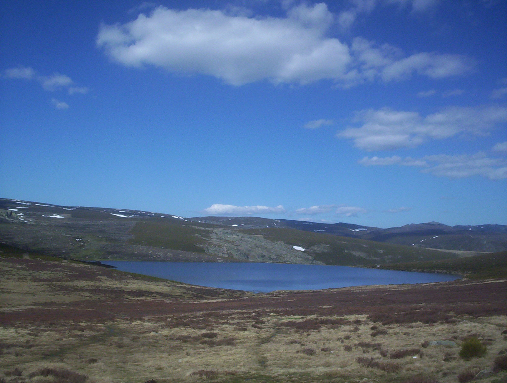 Laguna de los Peces. Parque Natural del Lago de Sanabria y Alrededores